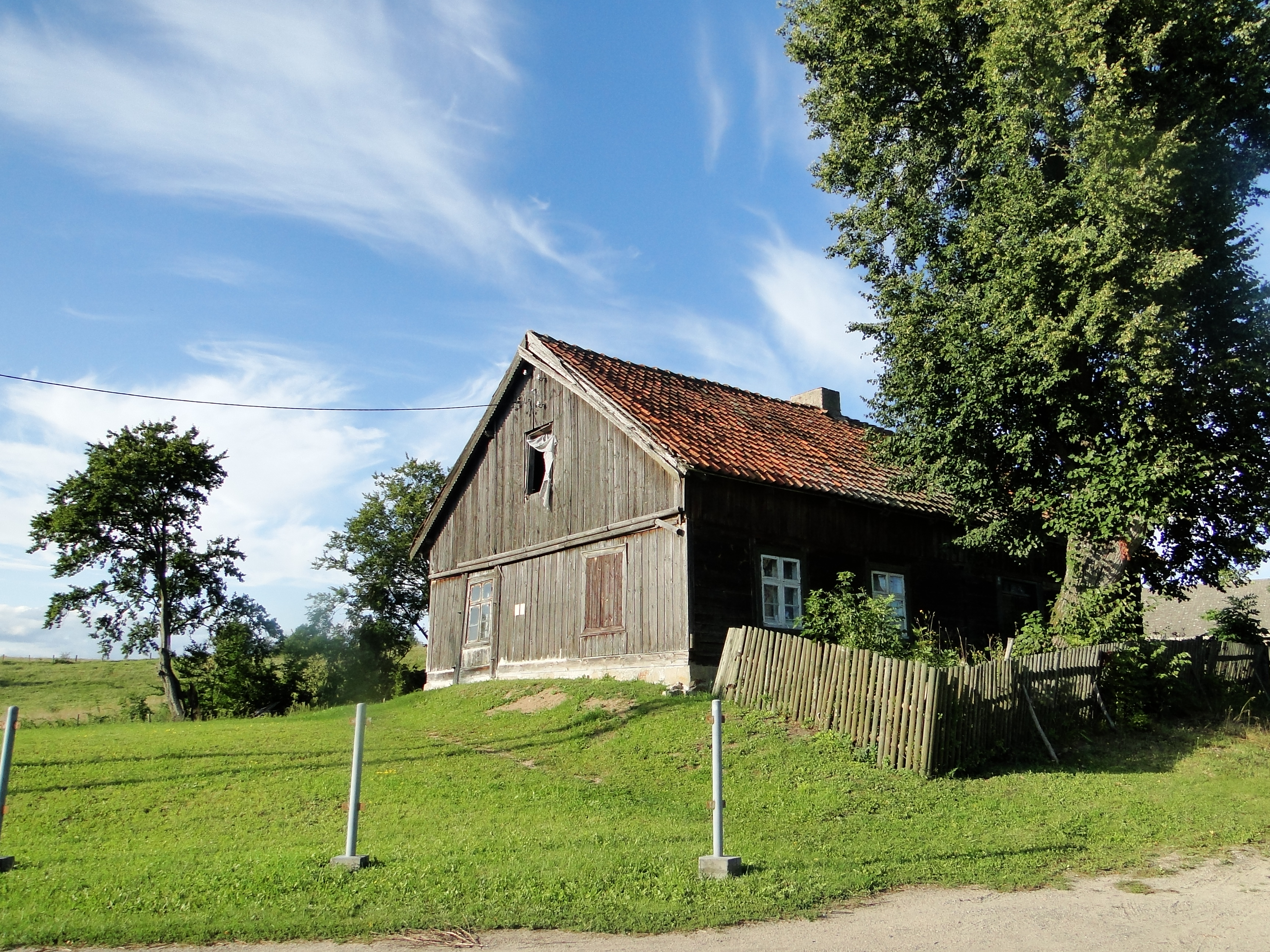 Chałupa, Stare Kiełbonki 4, Piecki